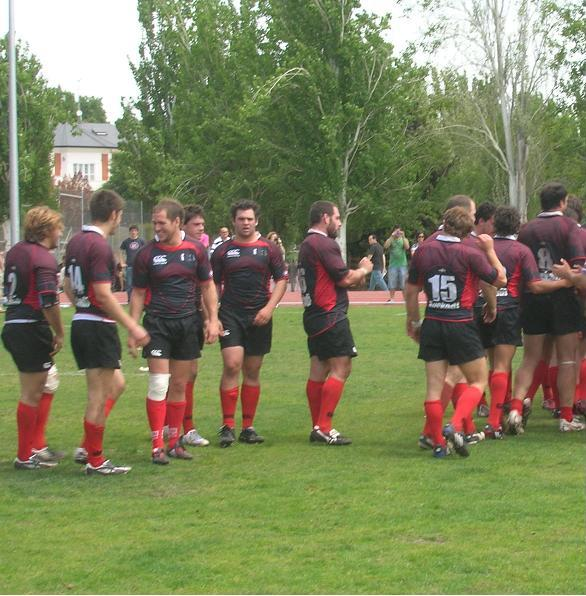 Jugadores korsarioaks